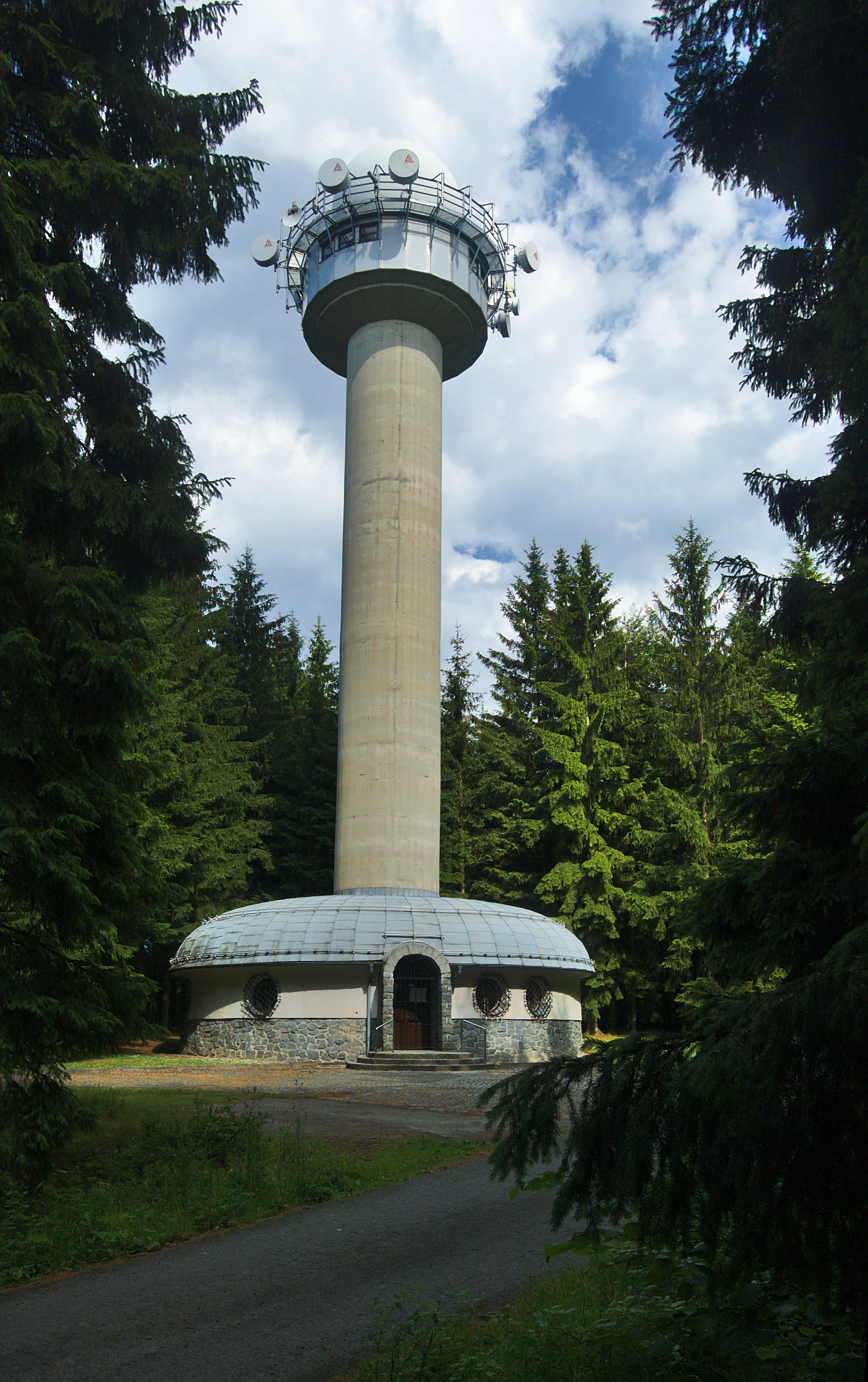 Meteoradar Skalky, Buková, okres Prostějov